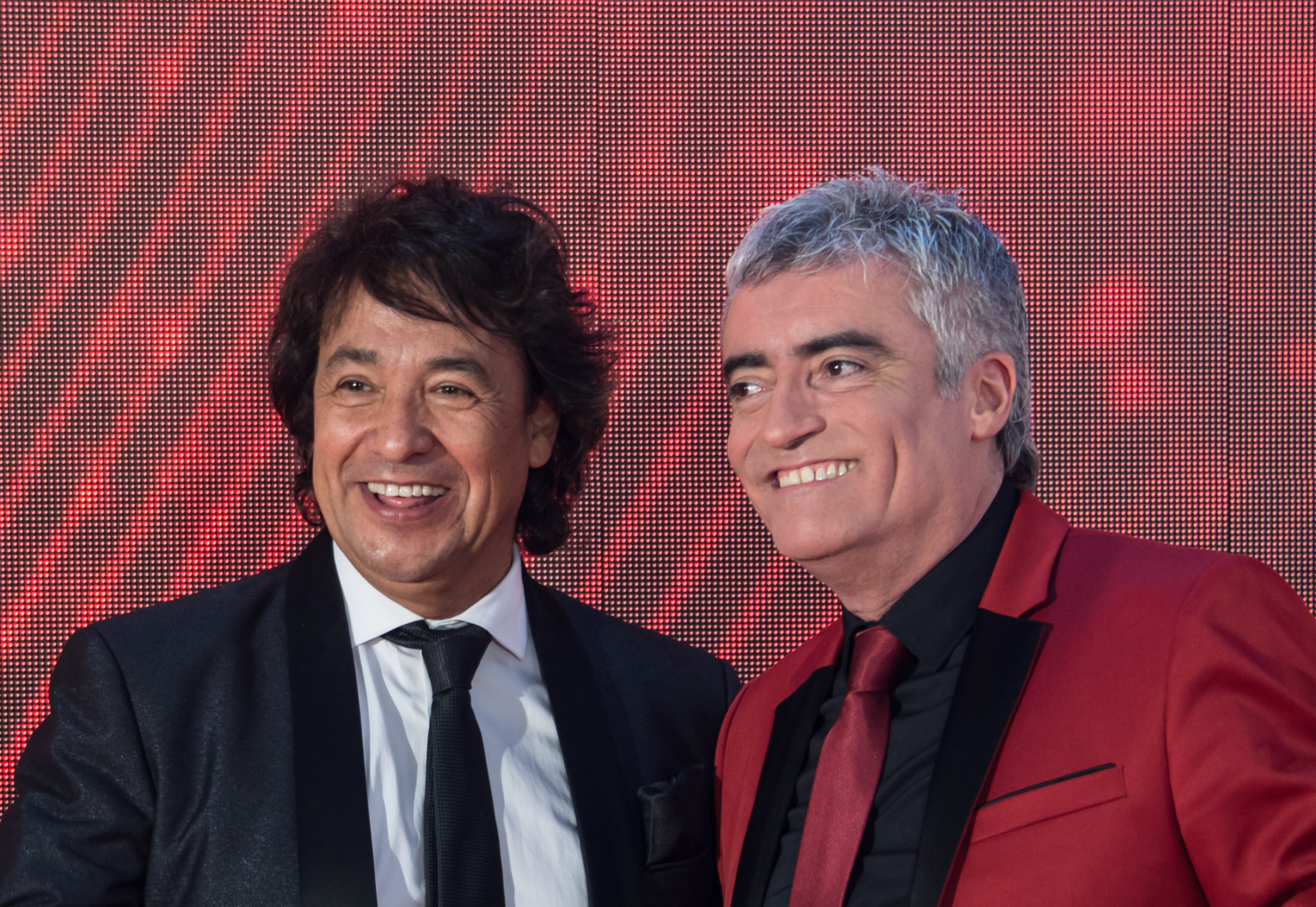 Gigi Martin y Mauricio Flores, Copihue de Oro 2018, Sun Monticello, Mostazal, Región de O'Higgins, Chile